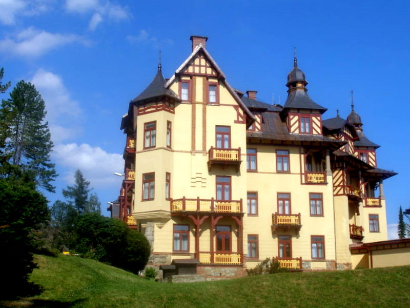 Secesný Hotel Grand, Starý Smokovec z roku 1904 autor: Guido Hoepfner